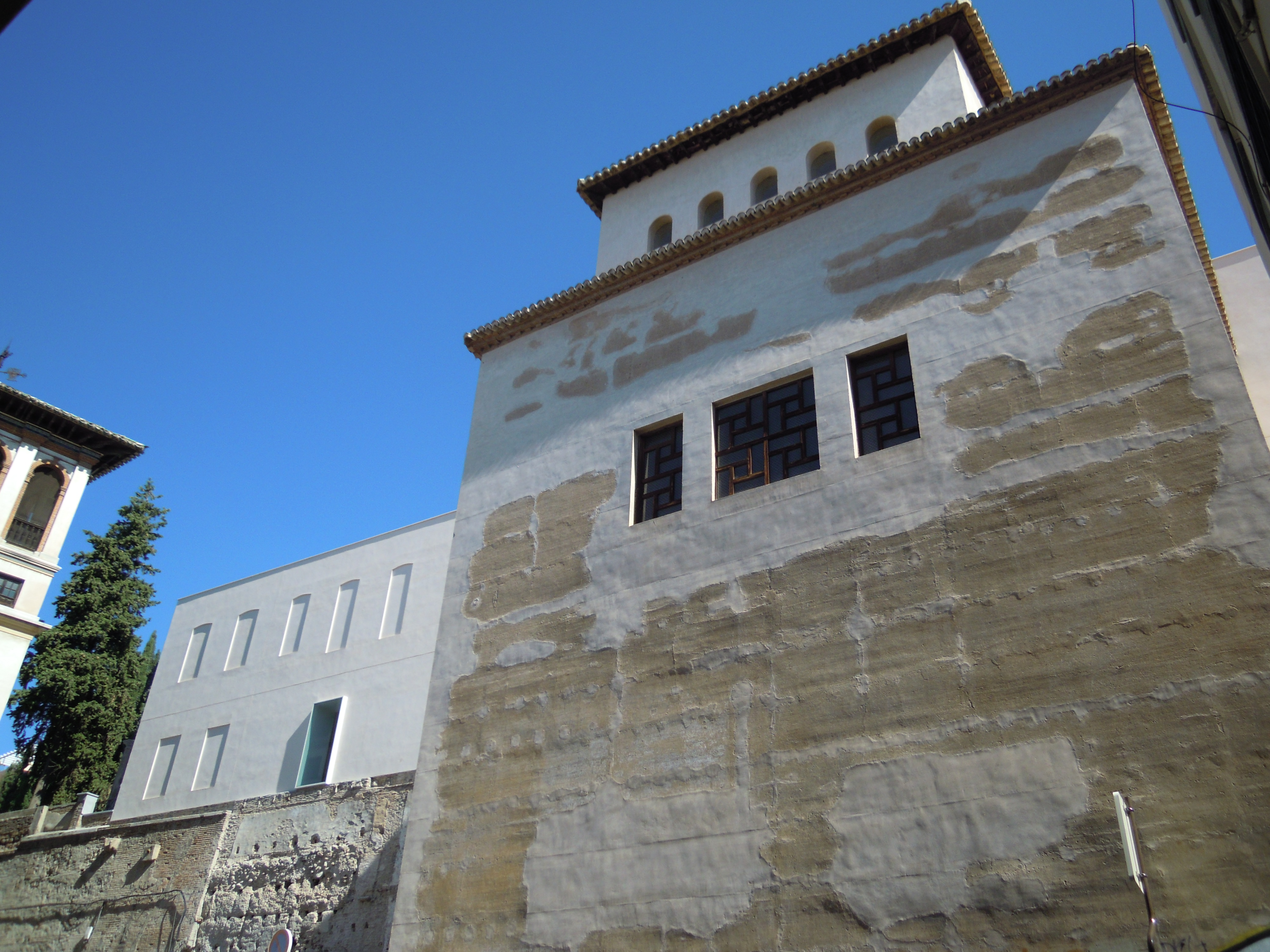 Cuarto Real de Santo Domingo (exterior)